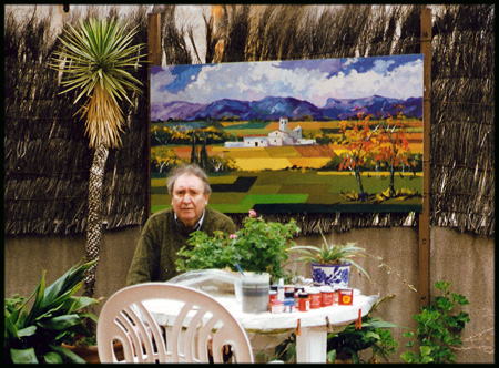 Foto del artista